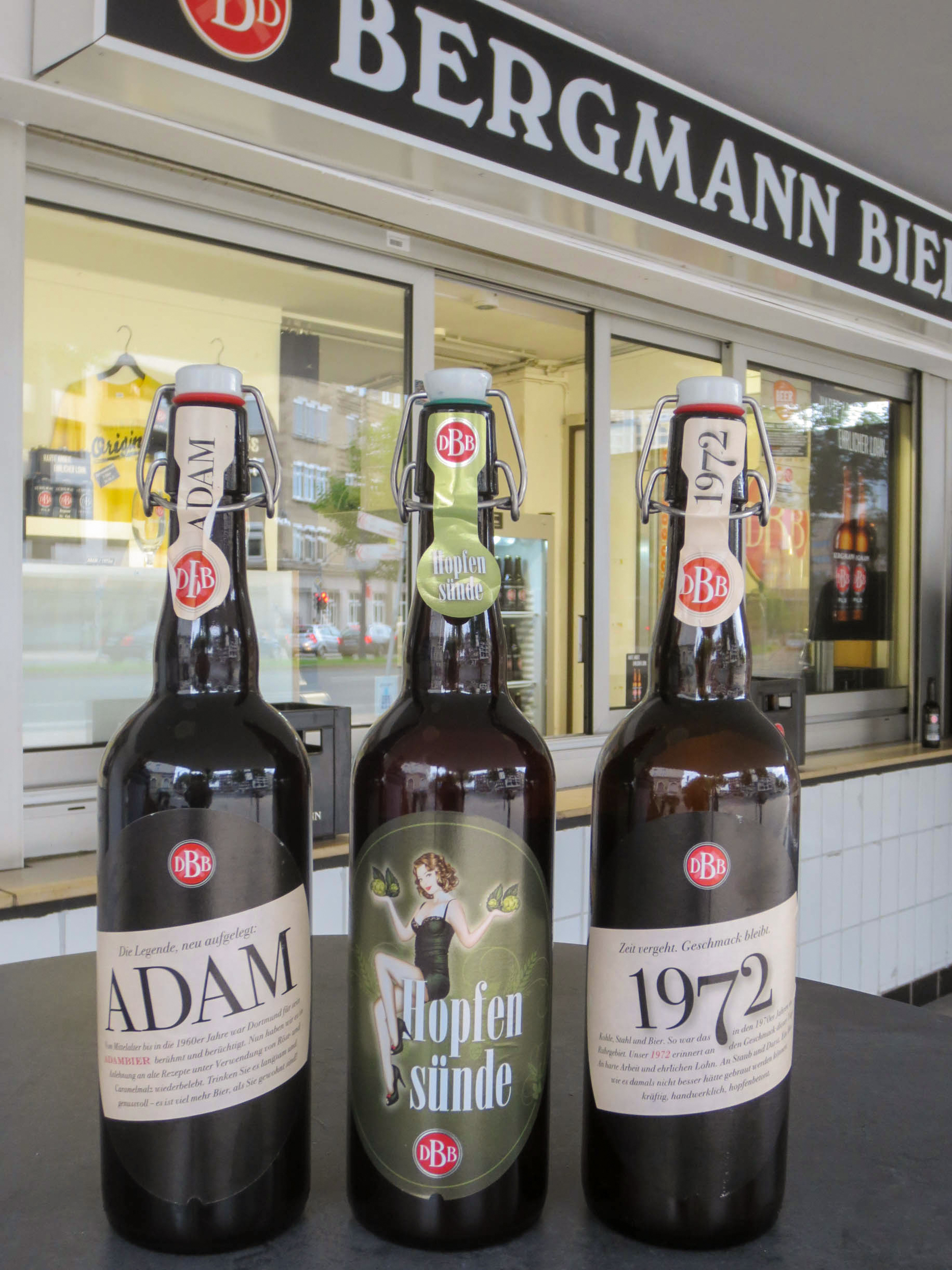 Spezialbiere der Bergmann Brauerei am denkmalgeschützten Kiosk in Dortmund, der von der Brauerei bewirtschaftet wird.